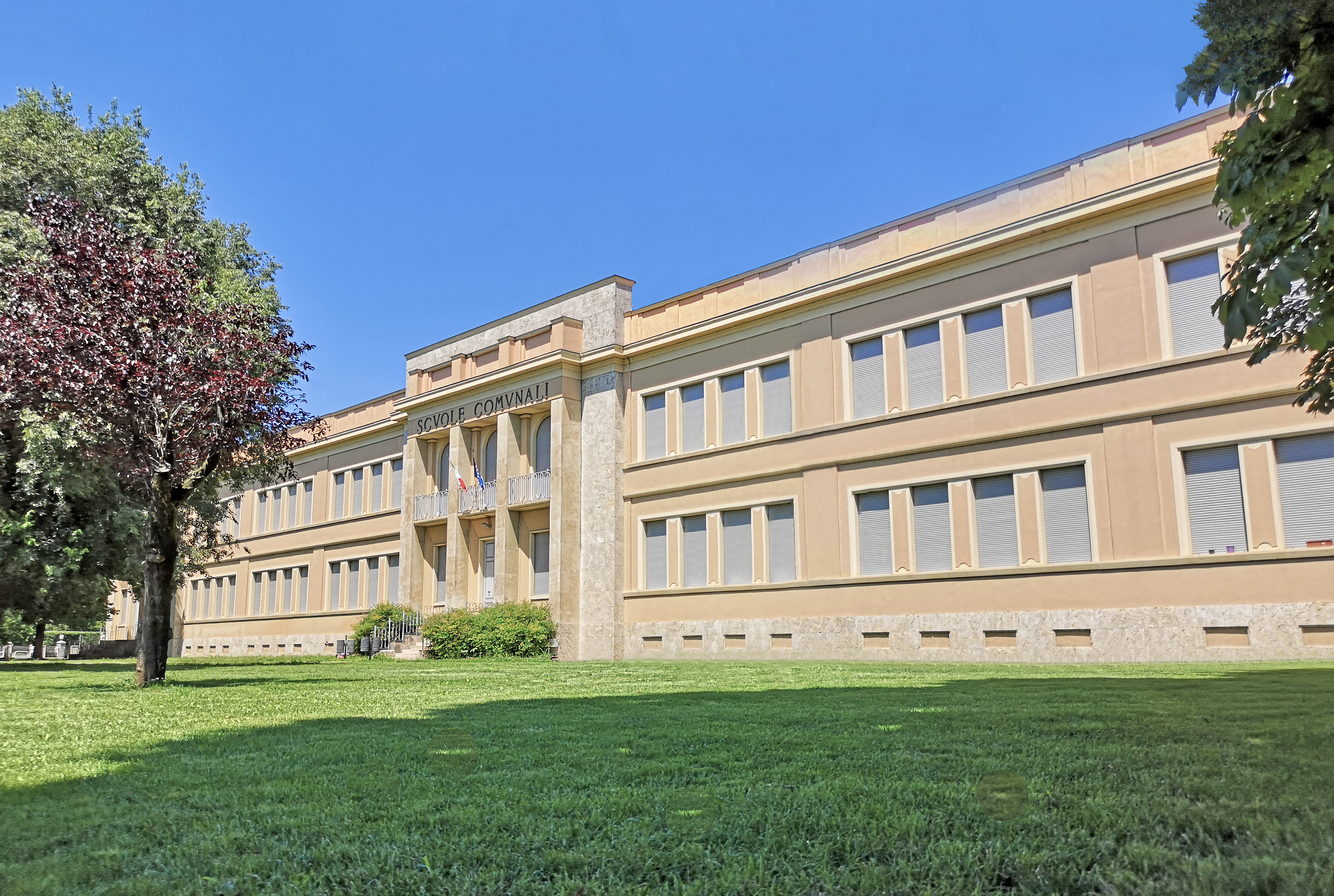 Facciata sud delle scuole elementari di Travagliato